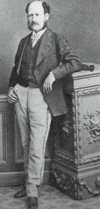 Alain de Monéys, mort en 1870 au cours du drame de Hautefaye